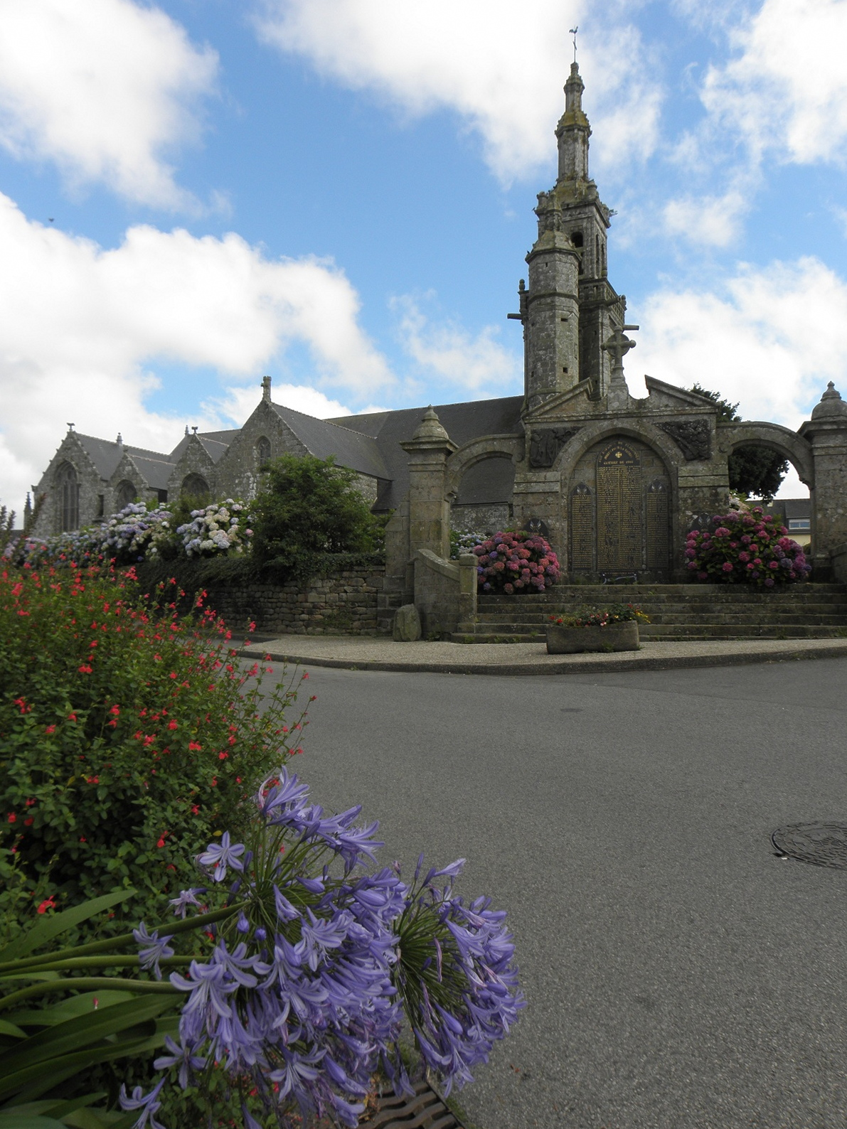 Vue septentrionalede l'église Saint-Thurien de Plogonnec (29).